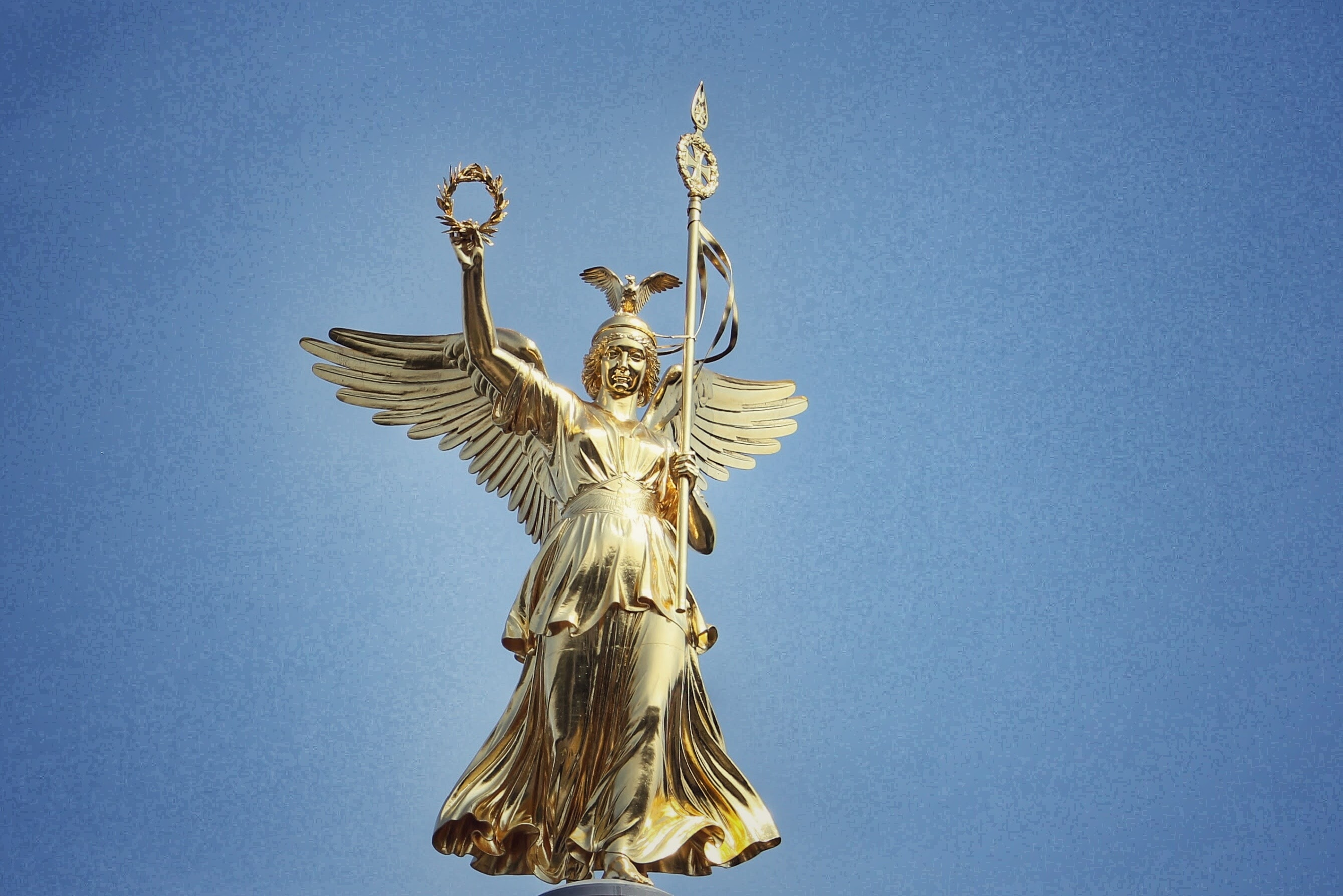 Berlin